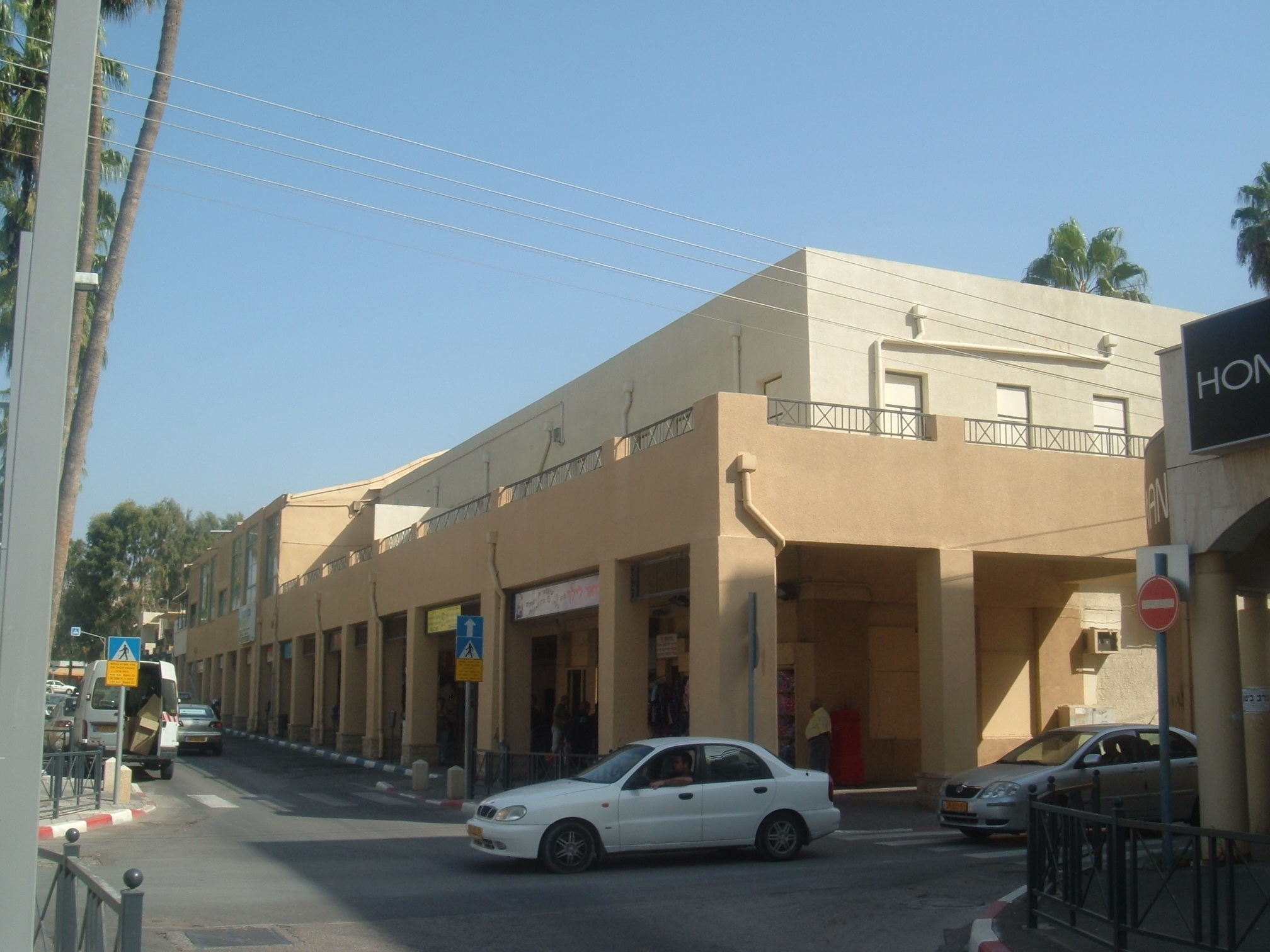 fiengold house, Arlosoroff blvd, Afula, Israel. בית פיינגולד, שדרות ארלוזורוב, עפולה, ישראל